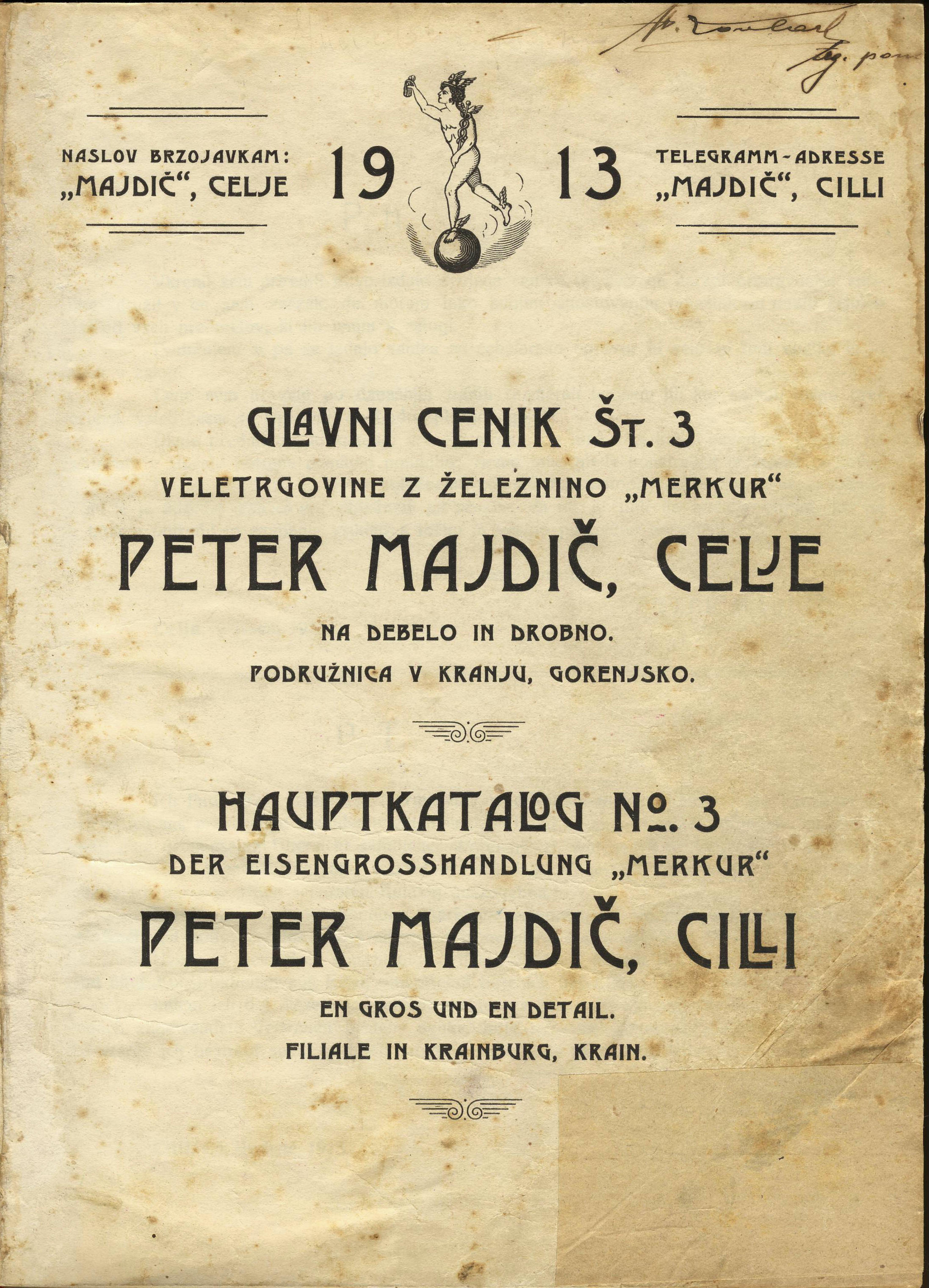 1913 Glavni cenik št. 3 Veletrgovina z železnino "Merkur" Peter Majdič, Celje. Na debelo in drobno. Podružnica v Kranju, Gorenjsko. 1913 Hauptkatalog No. 3 Der Eisengrosshandlung "Merkur" Peter Majdič, Cilli. En gros und en detail. Filiale in Krainburg, Krain.